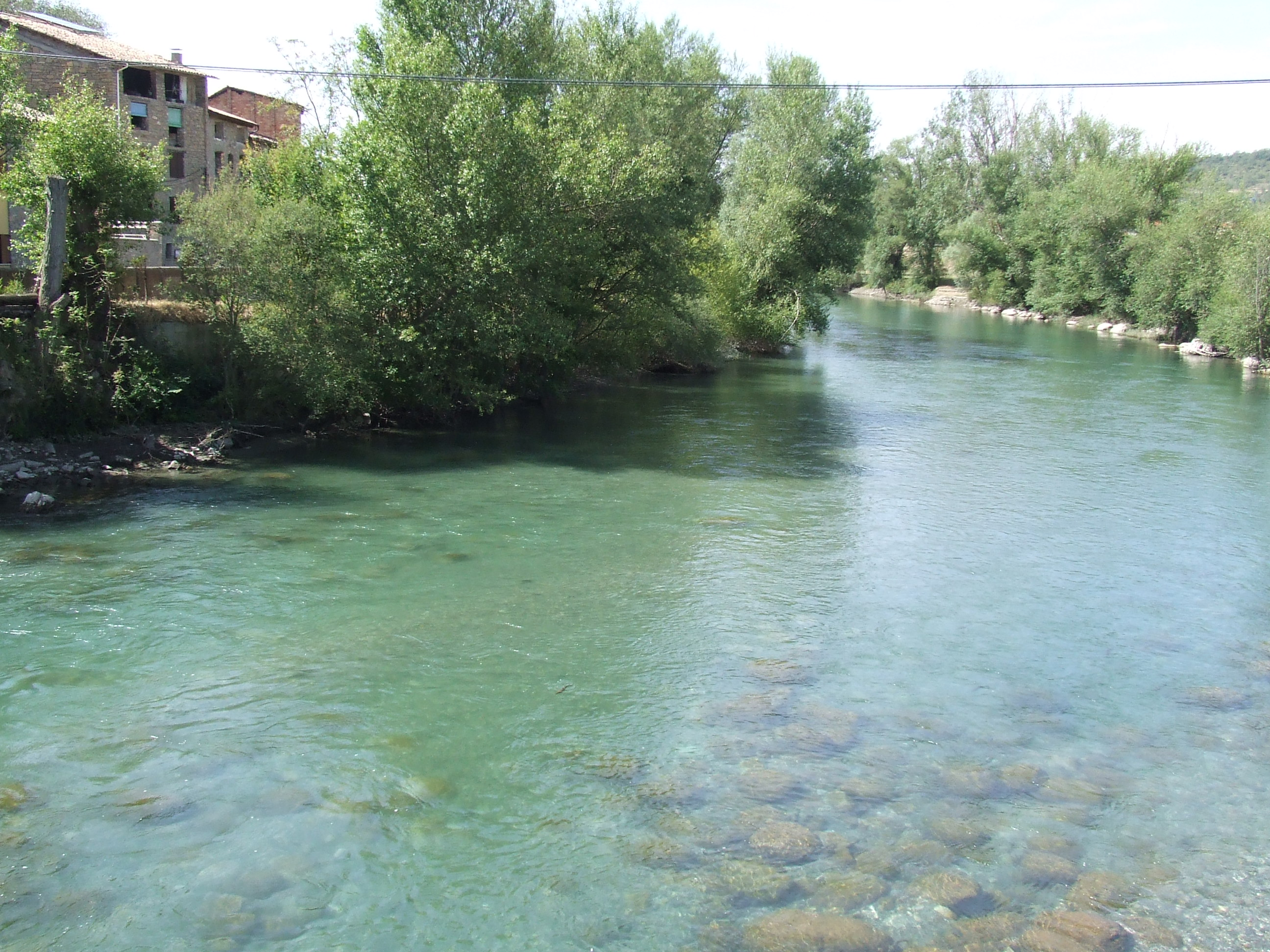 La Noguera Pallaresa al seu pas entre la Pobla de Segur i el Pont de Claverol (Pallars Jussà)